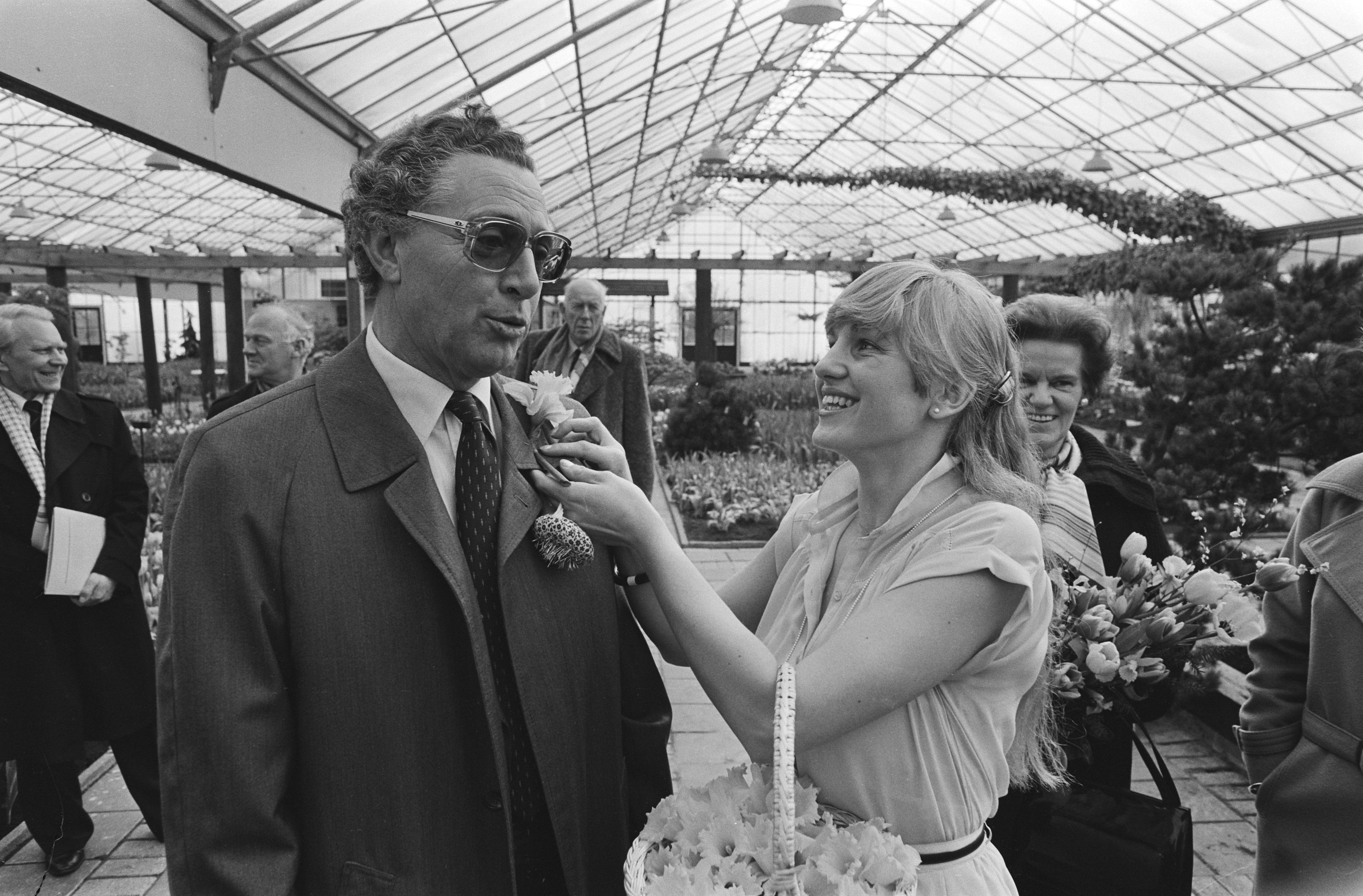 Collectie / Archief : Fotocollectie Anefo Reportage / Serie : [ onbekend ] Beschrijving : Staatssecretaris Hazekamp (EZ) opende keukenhof in Lisse, Hazekamp krijgt een bloem opgespeld Datum : 26 maart 1981 Locatie : Lisse, Zuid-Holland Trefwoorden : openingen, staatssecretarissen Persoonsnaam : Hazekamp, Th.M. Instellingsnaam : Keukenhof Fotograaf : Antonisse, Marcel / Anefo Auteursrechthebbende : Nationaal Archief Materiaalsoort : Negatief (zwart/wit) Nummer archiefinventaris : bekijk toegang 2.24.01.05 Bestanddeelnummer : 931-3973